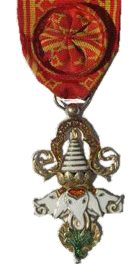 Description ordre Laotien du million d'éléphants et du parasol blanc. libre de droits ordre Laotien du million d'éléphants et du parasol blanc.